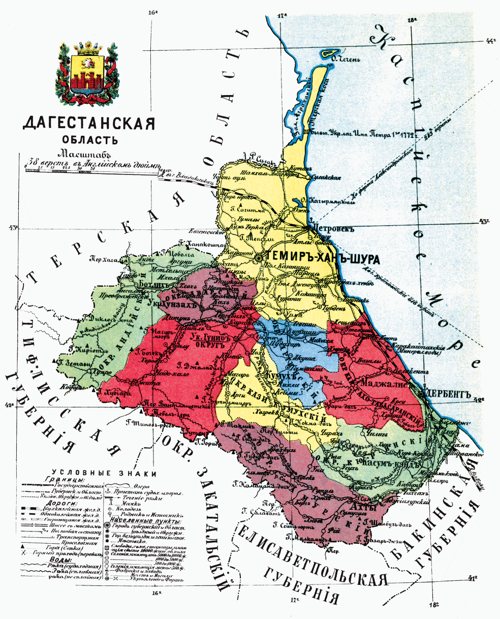 Карта Дагестанской области, 1913